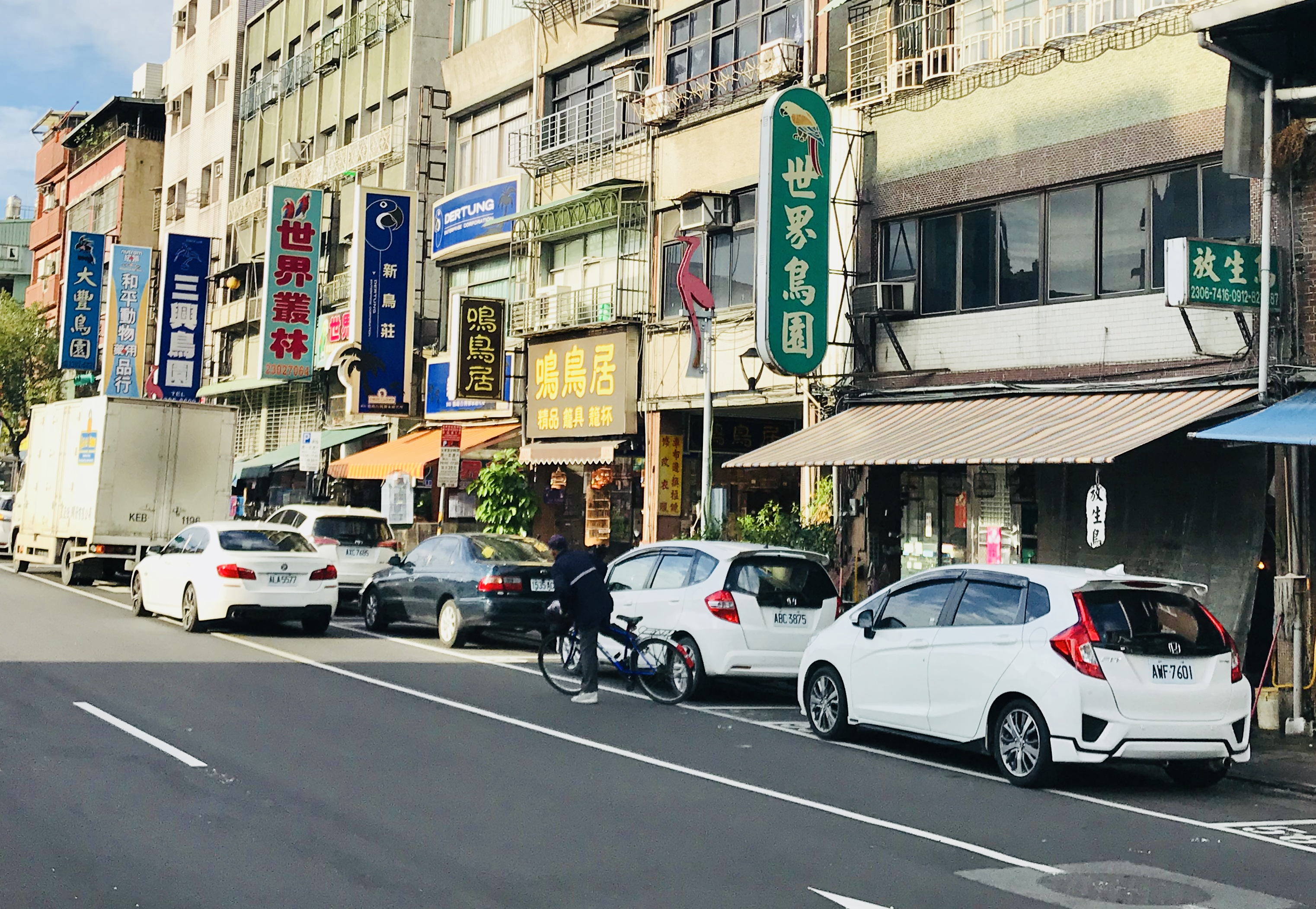 台北鳥店街一側的招牌，攝於和平西路馬路中央